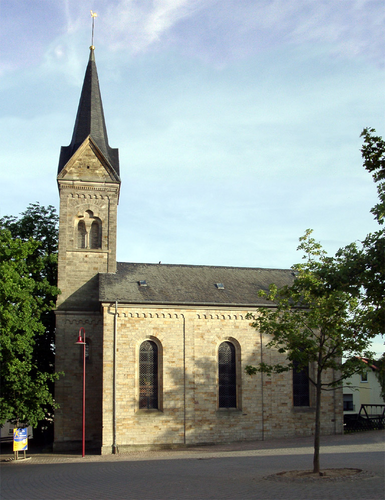 Evangelische Kirche in Vendersheim Fotografin: Christine Hofmann